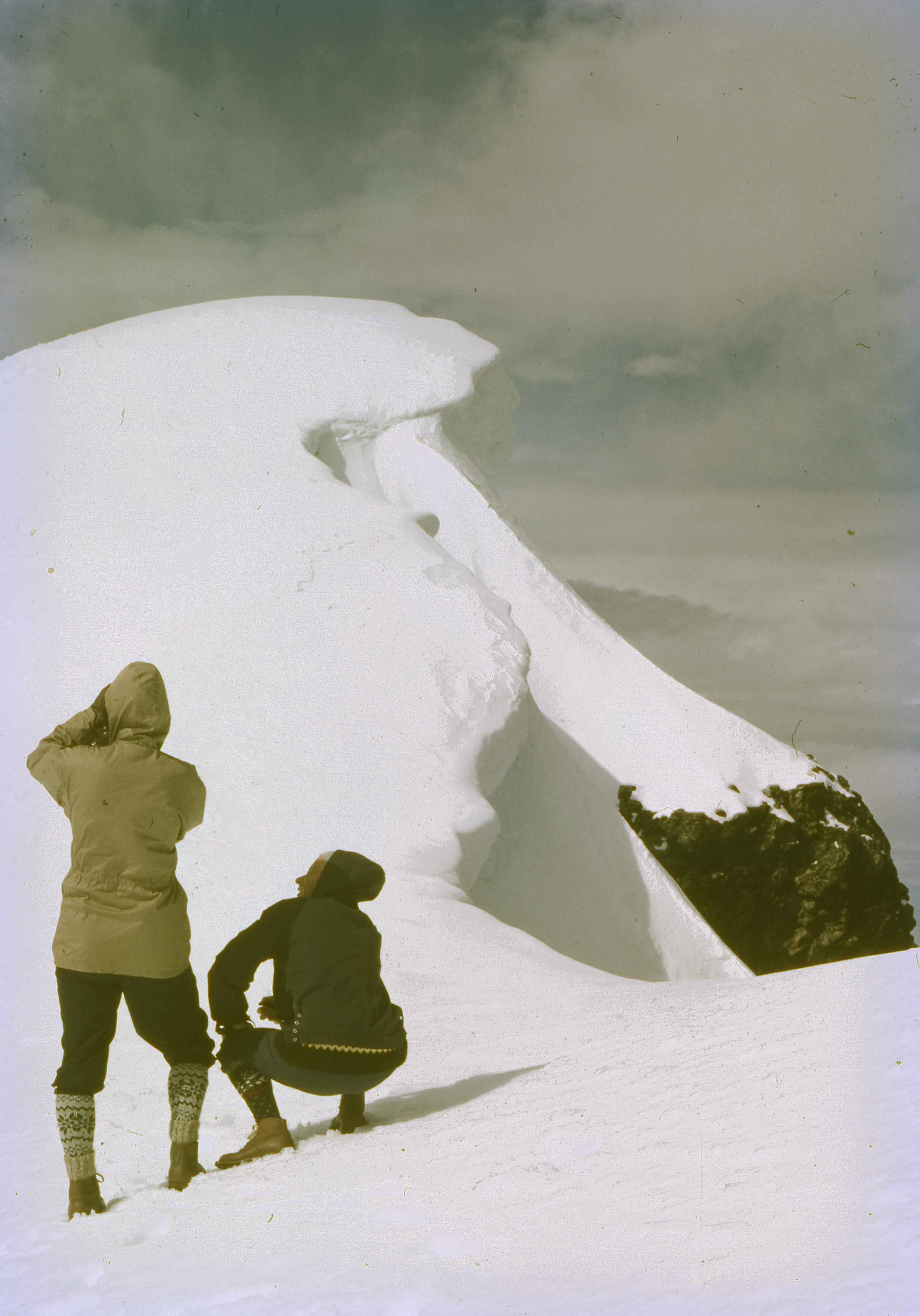 To fjellturister i nærheten av Glittertind, Norges nest høyeste fjelltopp (2465 m).